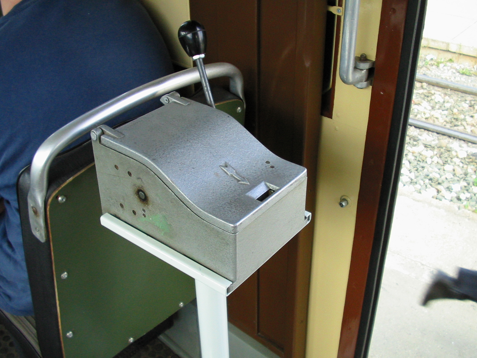 Handbetätigter Druckentwerter (Stempelentwerter) in einem Beiwagen des Jenaer Fahrschulzuges, wie er ab 25. Mai 1975 eingesetzt wurde.